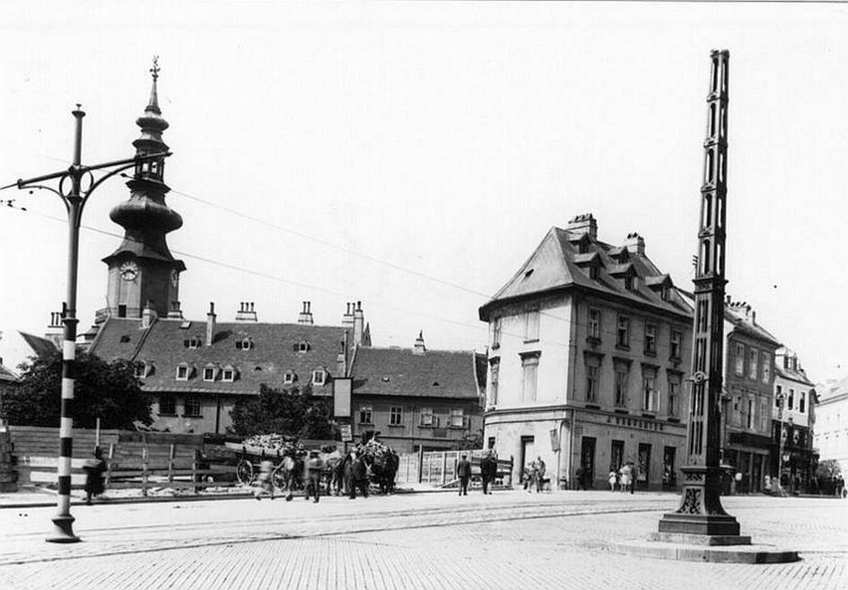 Zustand nach Abriss des Gasthauses "Schmidt Hansl" in den 20er Jahren des 20. Jh.